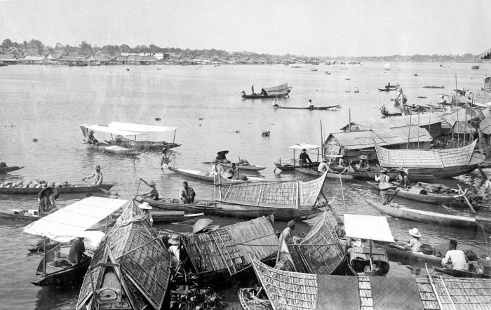 Repronegatief. Gezicht op de Moesi rivier bij Palembang